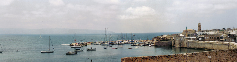 Acre